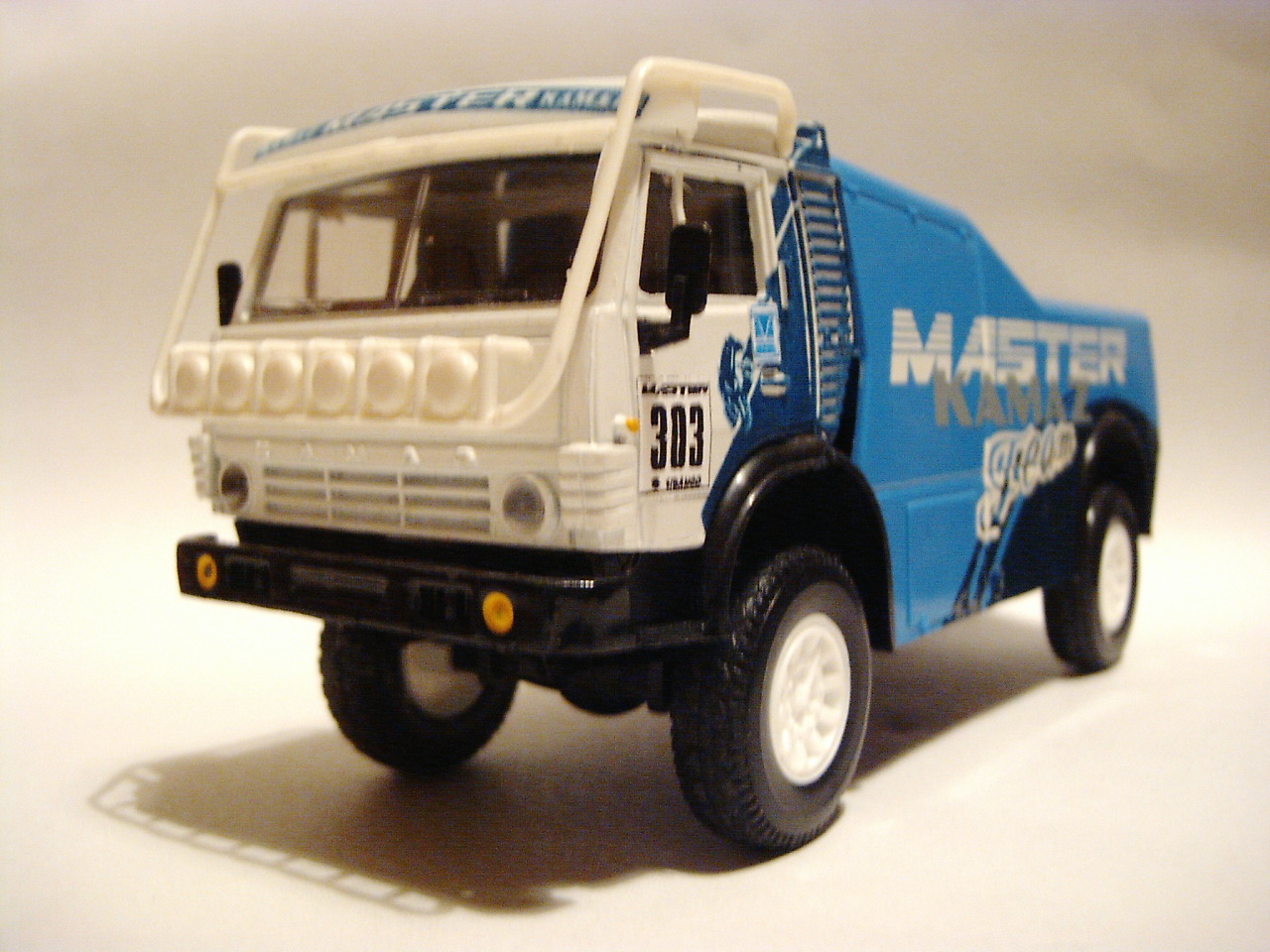 Description Apek modelauto van een Kamaz vrachtwagen uit de Dakar-rally. Date13 November 2006SourceOwn workAuthorJan Clevering Apek modelauto van een Kamaz vrachtwagen uit de Dakar-rally.